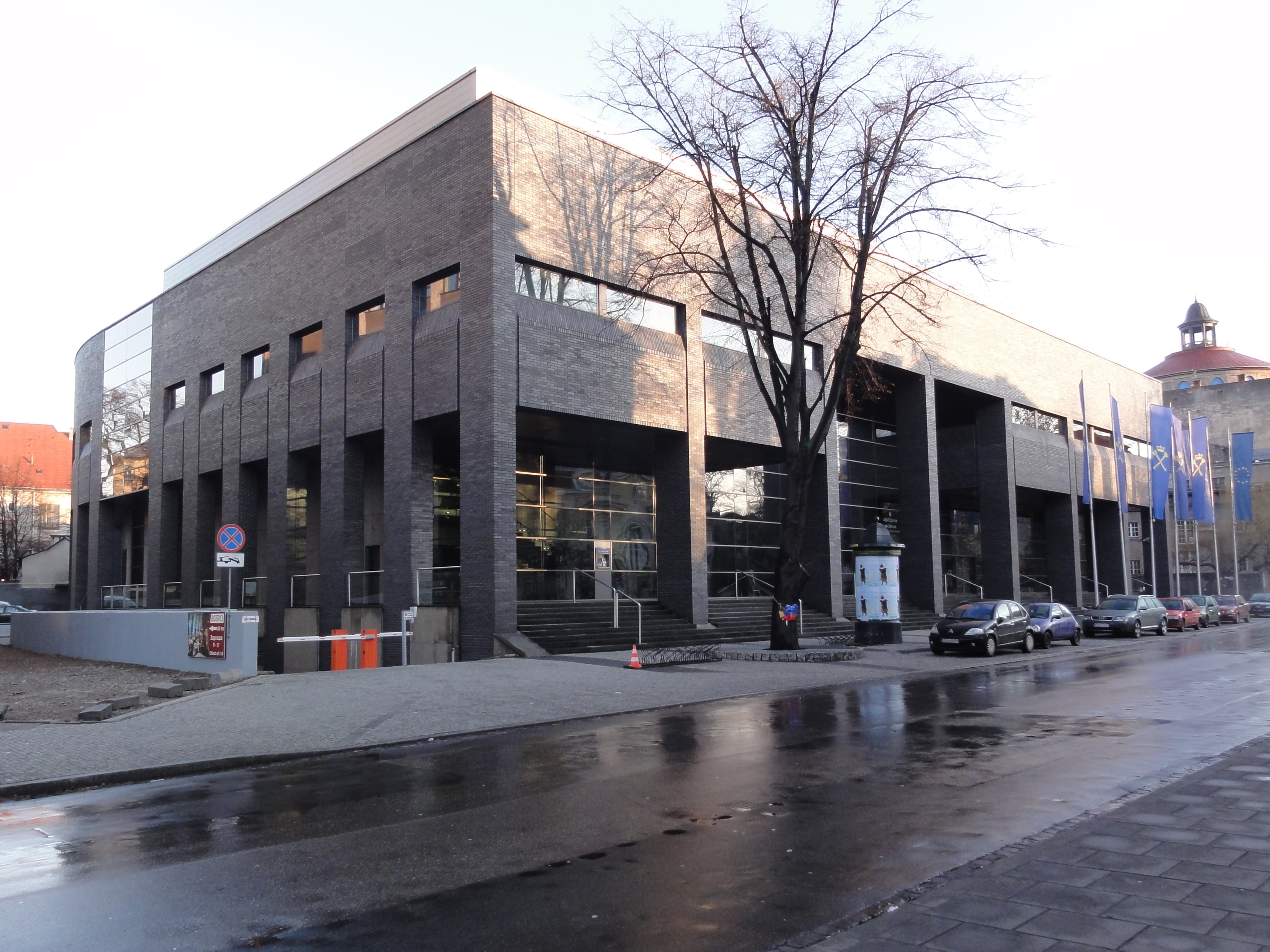 Auditorium Maximum Uniwersytetu Jagiellońskiego w Krakowie